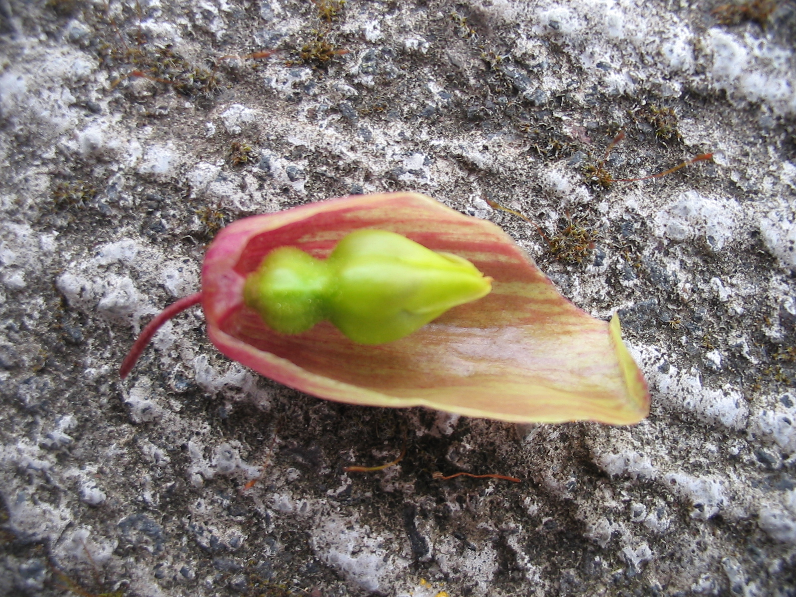 Goethepflanze (Kalanchoe pinnata) - Blüte, geöffnet, Innere Blütenorgane